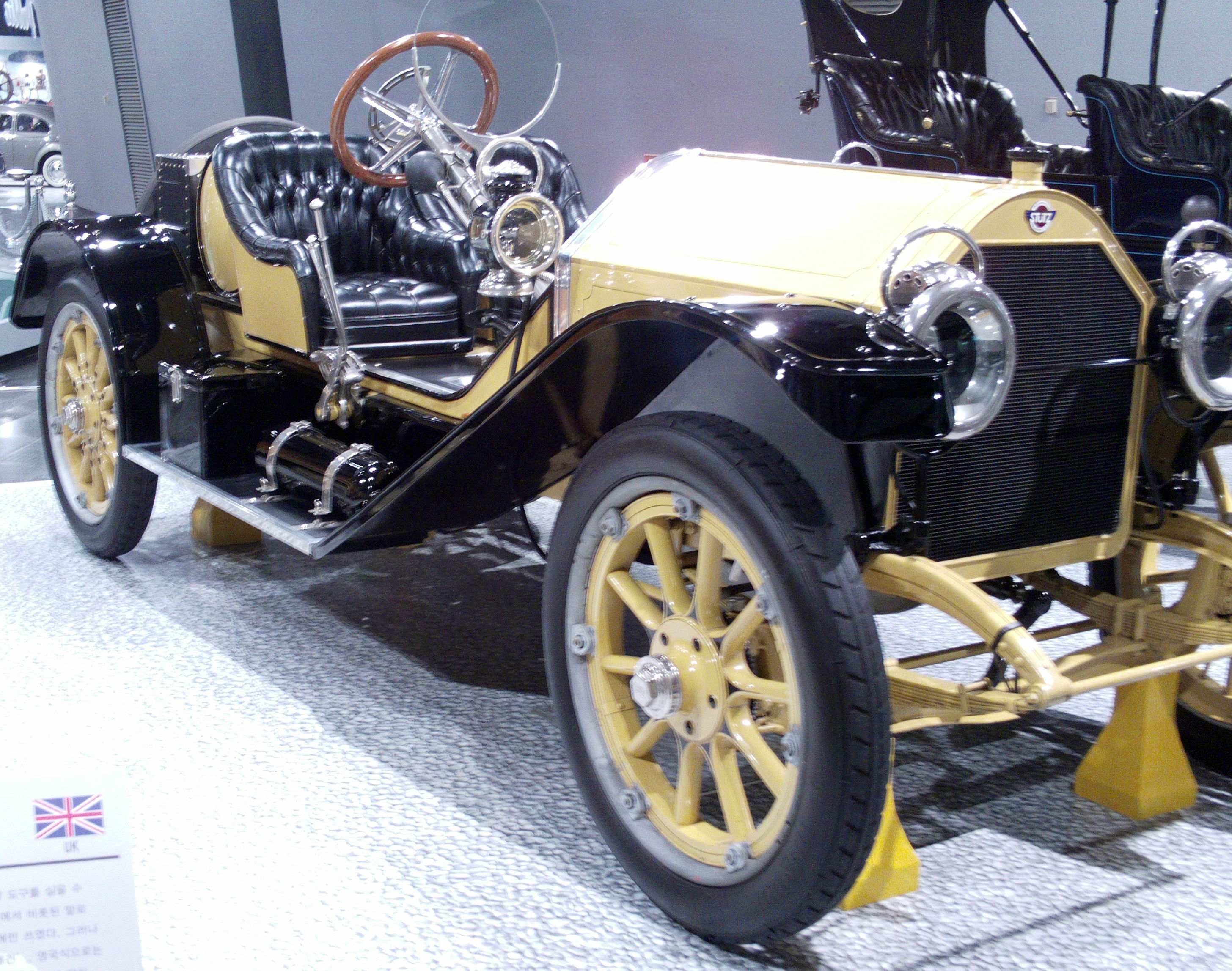 1912 Stutz Bearcat Speedster